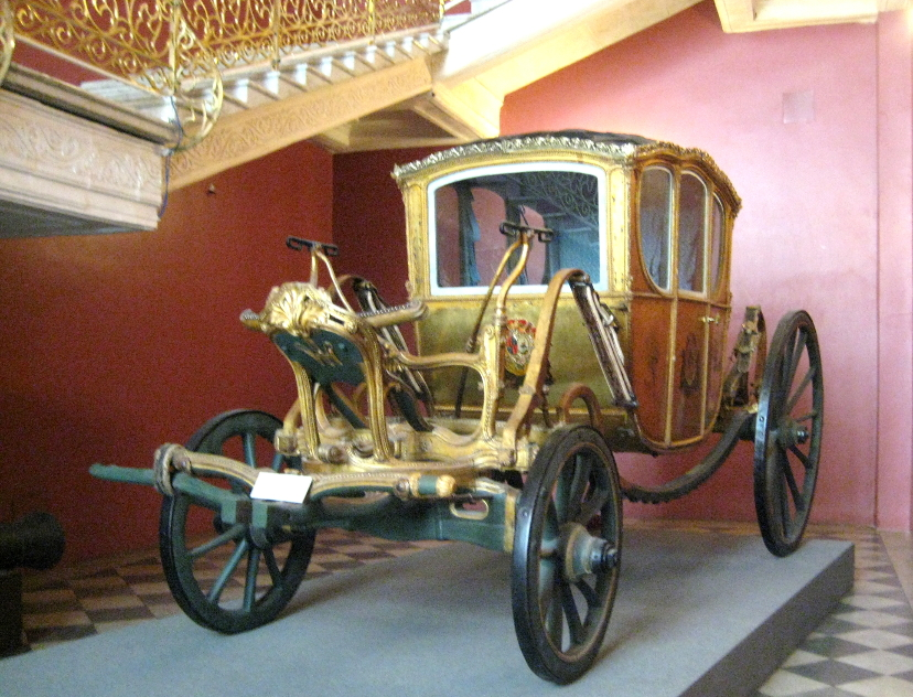 Карета четырехместная "берлин". Россия. 1760-е. Мастер Э. Кенель. Рессоры изготовлены мастером П. Жакеном. Дерево, серебро, черный и цветные металлы, перламутр, стекло, резьба по дереву, токарная, столярная и слесарная работа, литье, чеканка, ковка, штамп, золочение, серебрение, полихромная роспись. Бархат, атлас, шелк, золотные нити, льняной холст, кожа, конский волос, ткачество. ГИМ